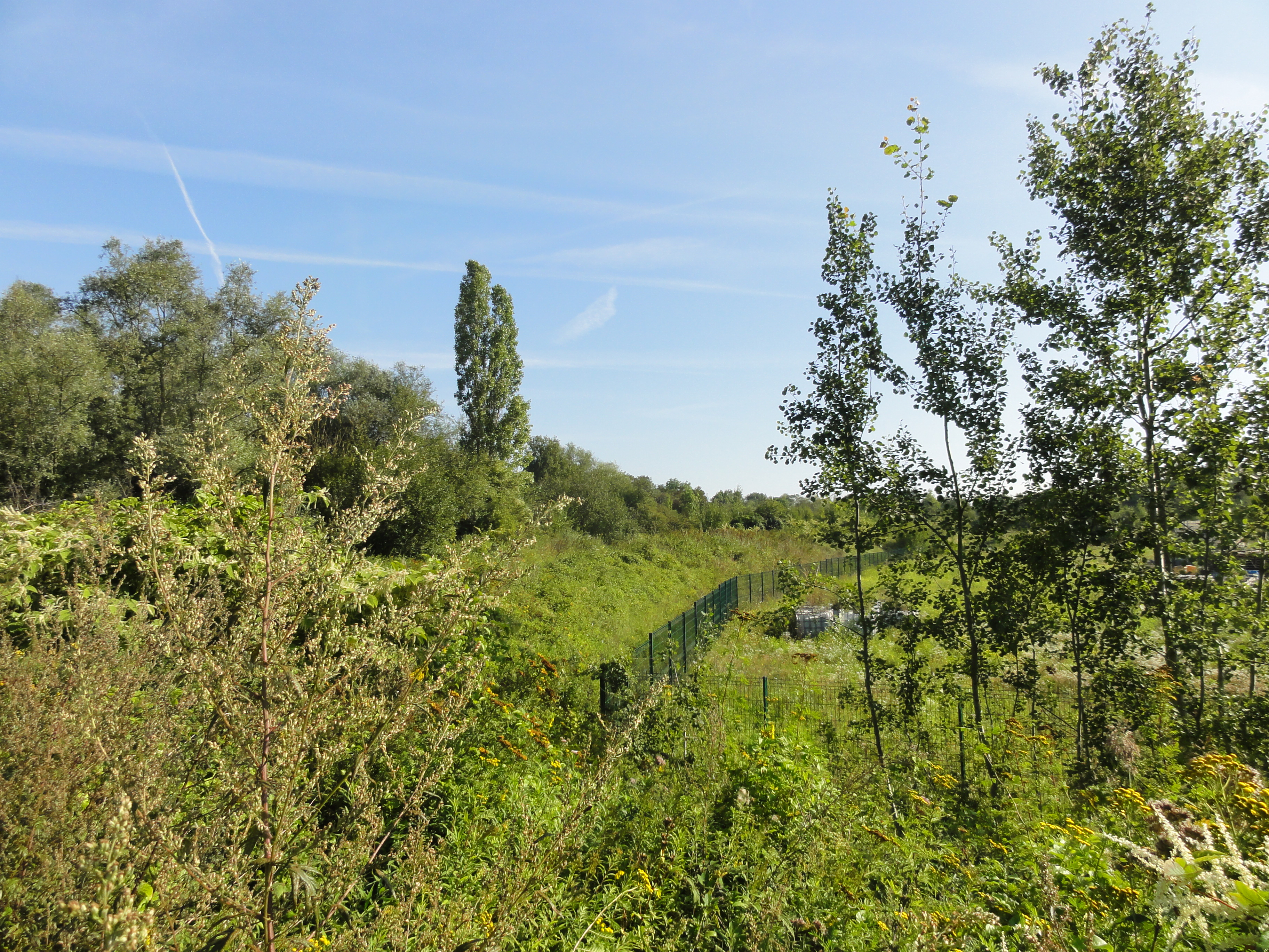 Terril n° 167 dit Douchy, Fosse Douchy de la Compagnie des mines de Douchy, Douchy-les-Mines, Nord, Nord-Pas-de-Calais, France.